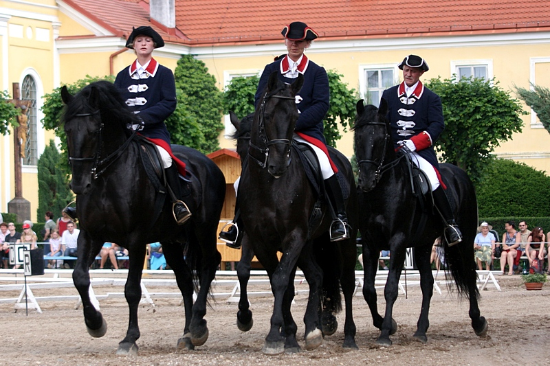 Black kladruber horses